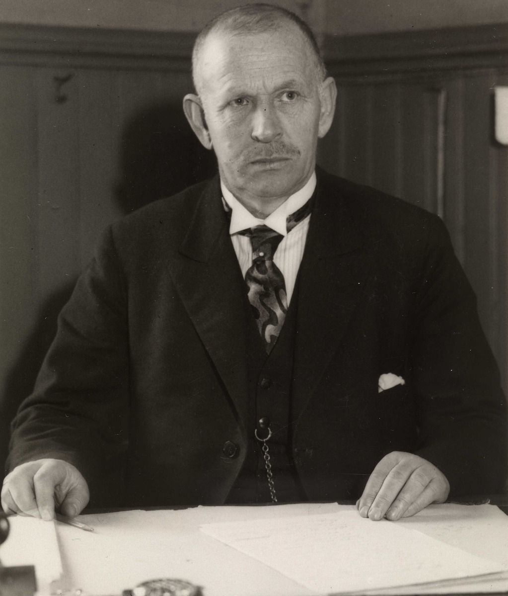 Kommanderende general Kristian Laake, ca. 1930-35